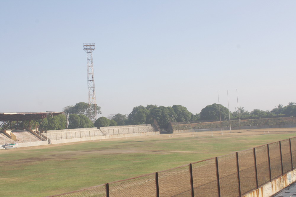 Stadion Bima Kota Cirebon, berada di pinggiran Kota Cirebon, Propinsi Jawa Barat. Date, 29 Juli 2012 Foto Jie73